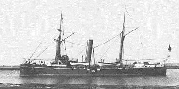 Crucero proteguido de 2ª clase español Isla de Cuba de la Clase Isla de Luzón.